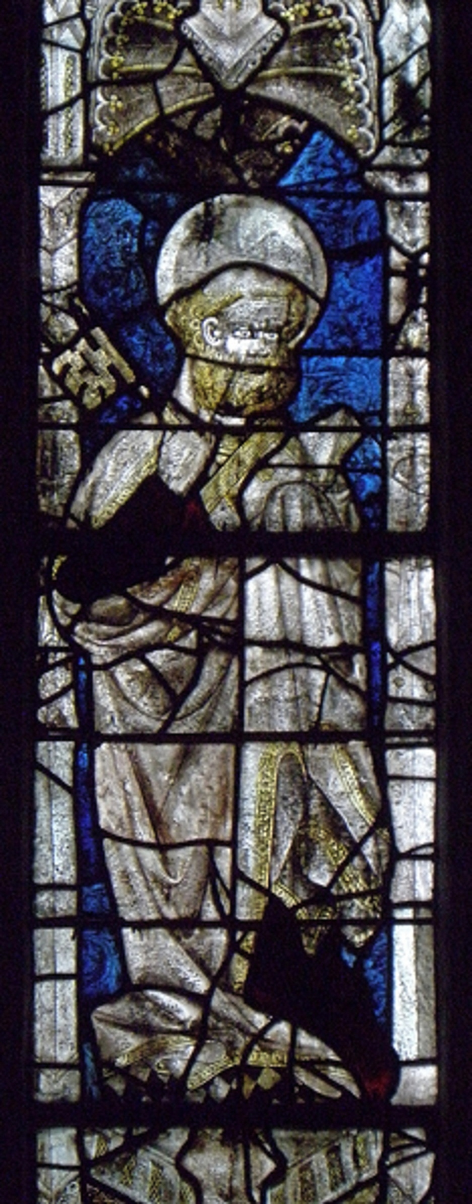 Saint-Pierre. Maîtresse-vitre de l'église Notre-Dame de Runan (22).